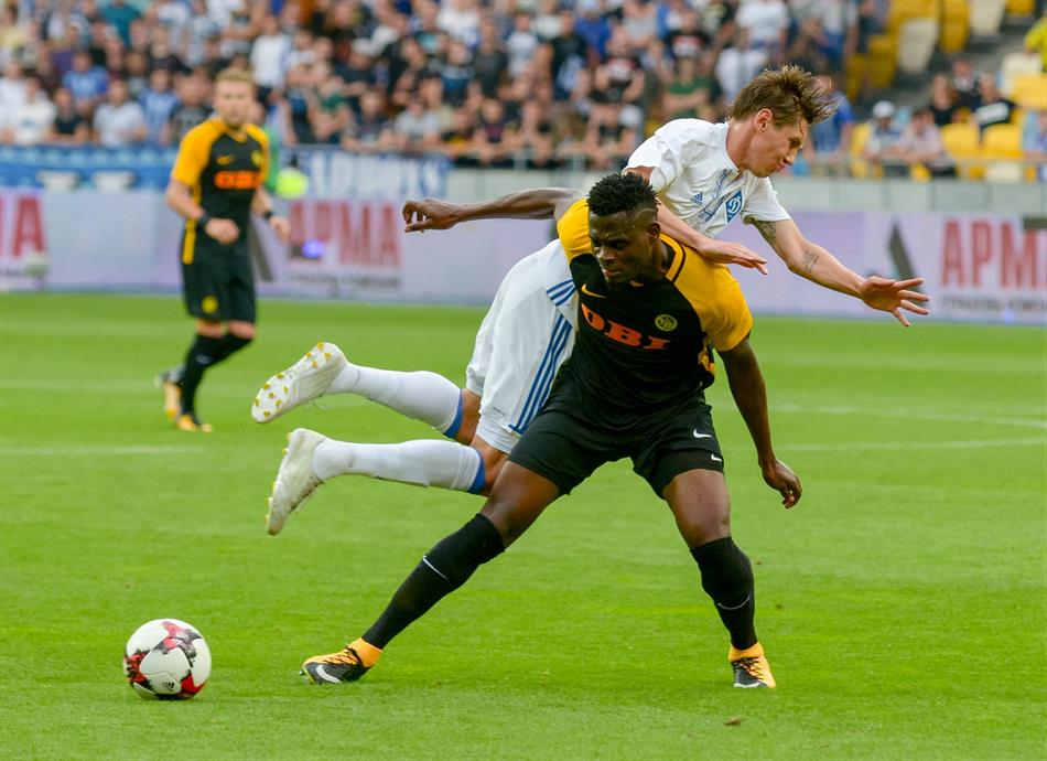 Kasim Adams Nuhu beim CL-Qualifikations-Hinspiel Dynamo Kiew gegen BSC Young Boys